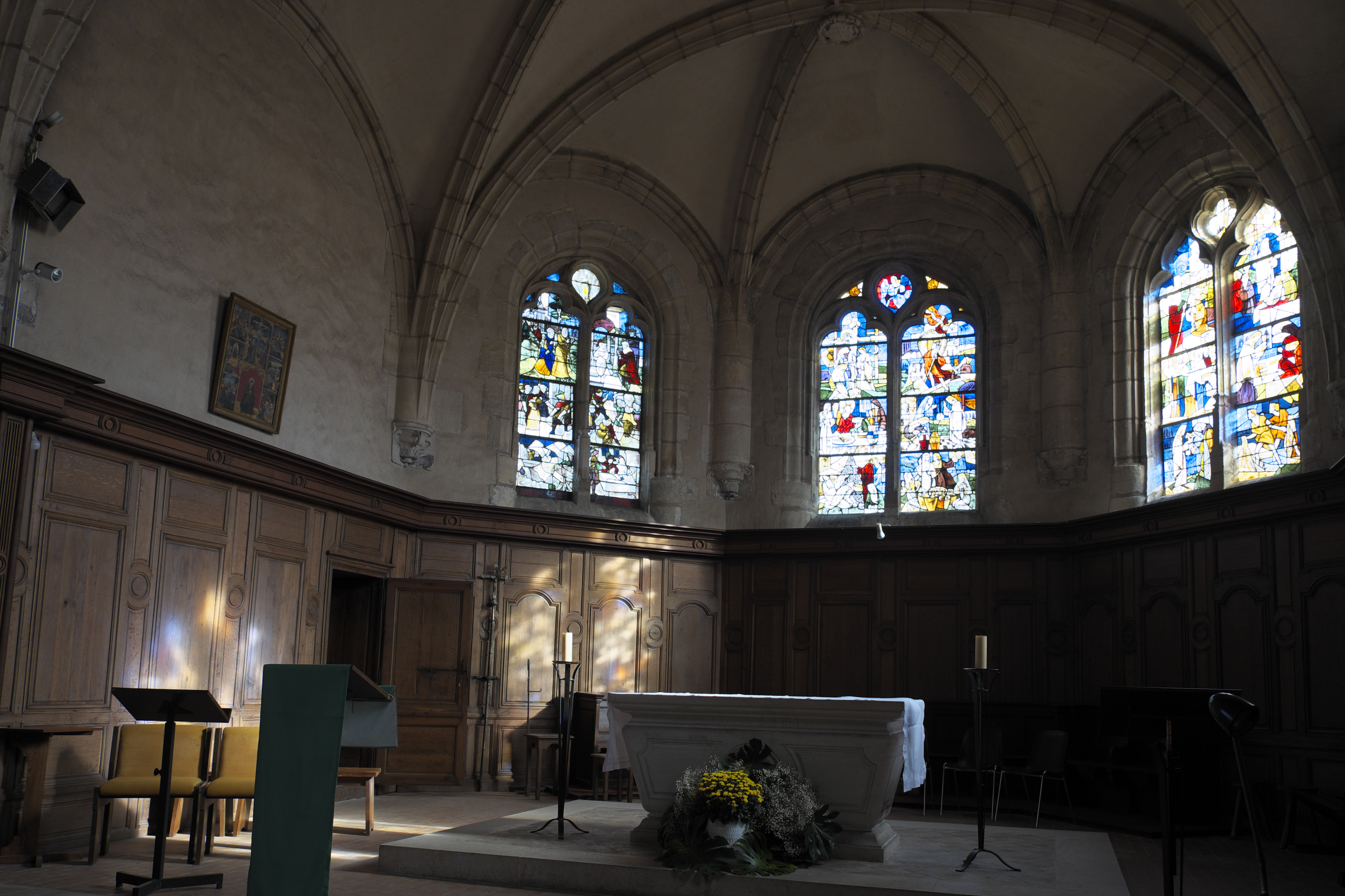 Katholische Kirche Saint-Germain-d’Auxerre in Coignières im Département Yvelines (Île-de-France/Frankreich), Chor